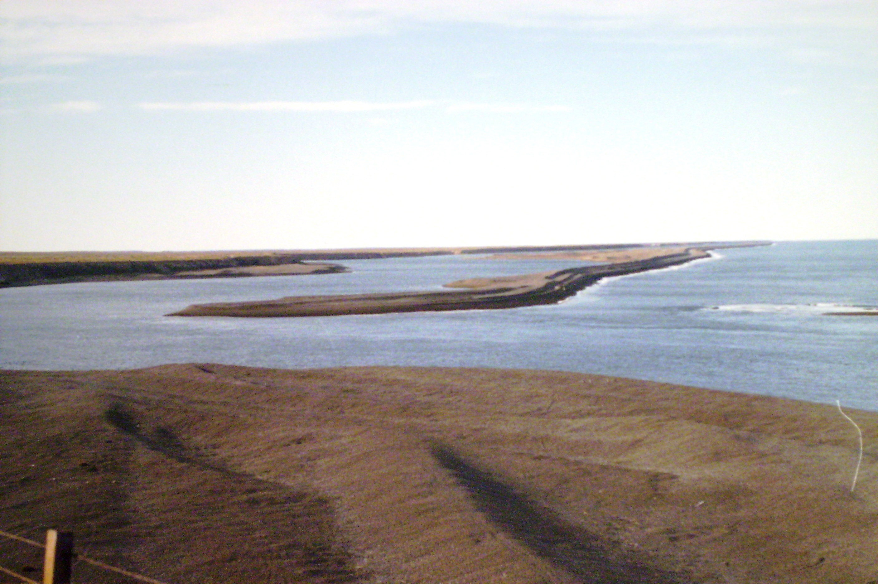 Extremo sur de la caleta Valdés en la península del mismo nonbre, Chubut, Argentina